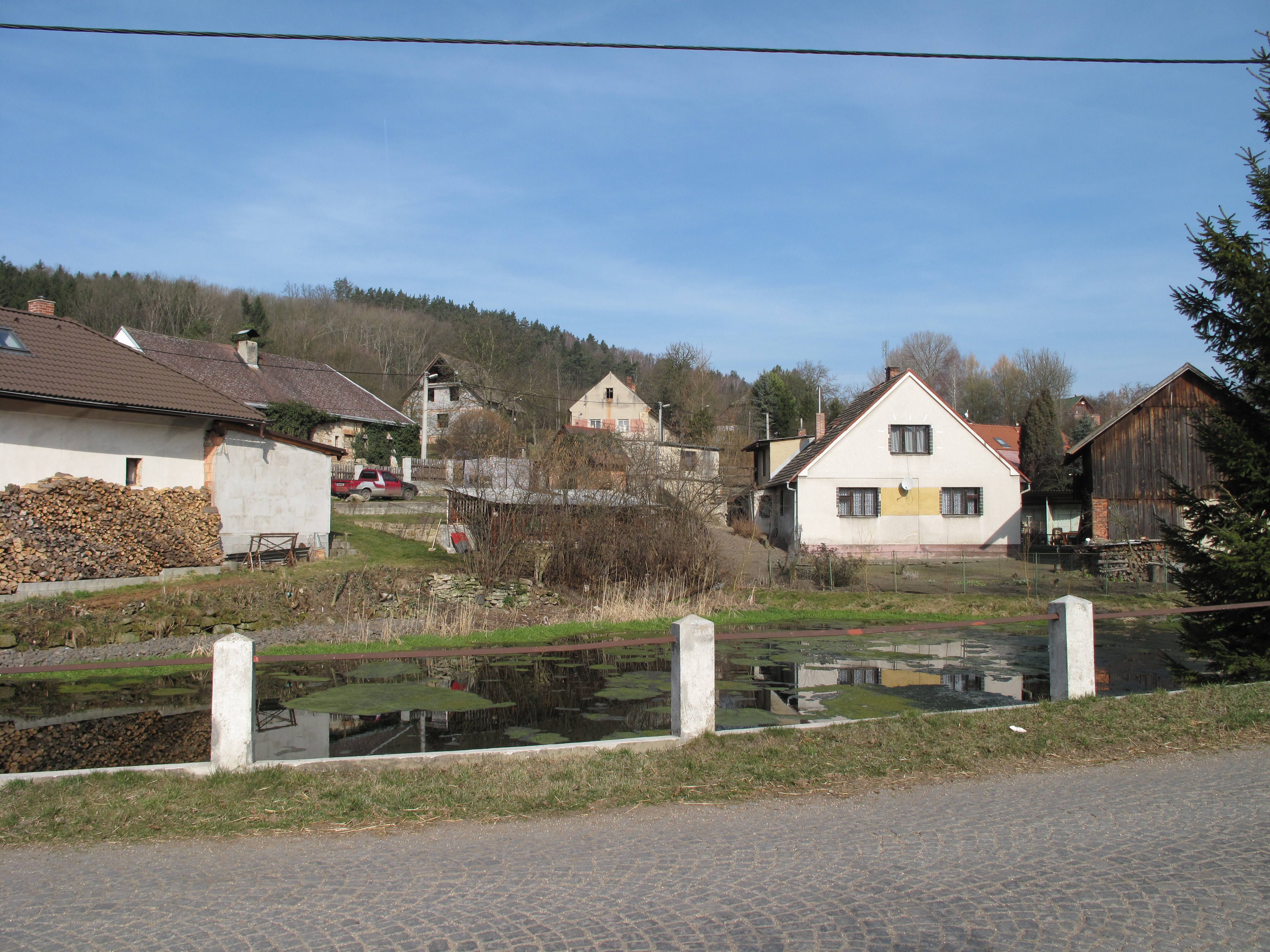 Rybník v Podolí. Okres Mladá Boleslav, Česká republika.